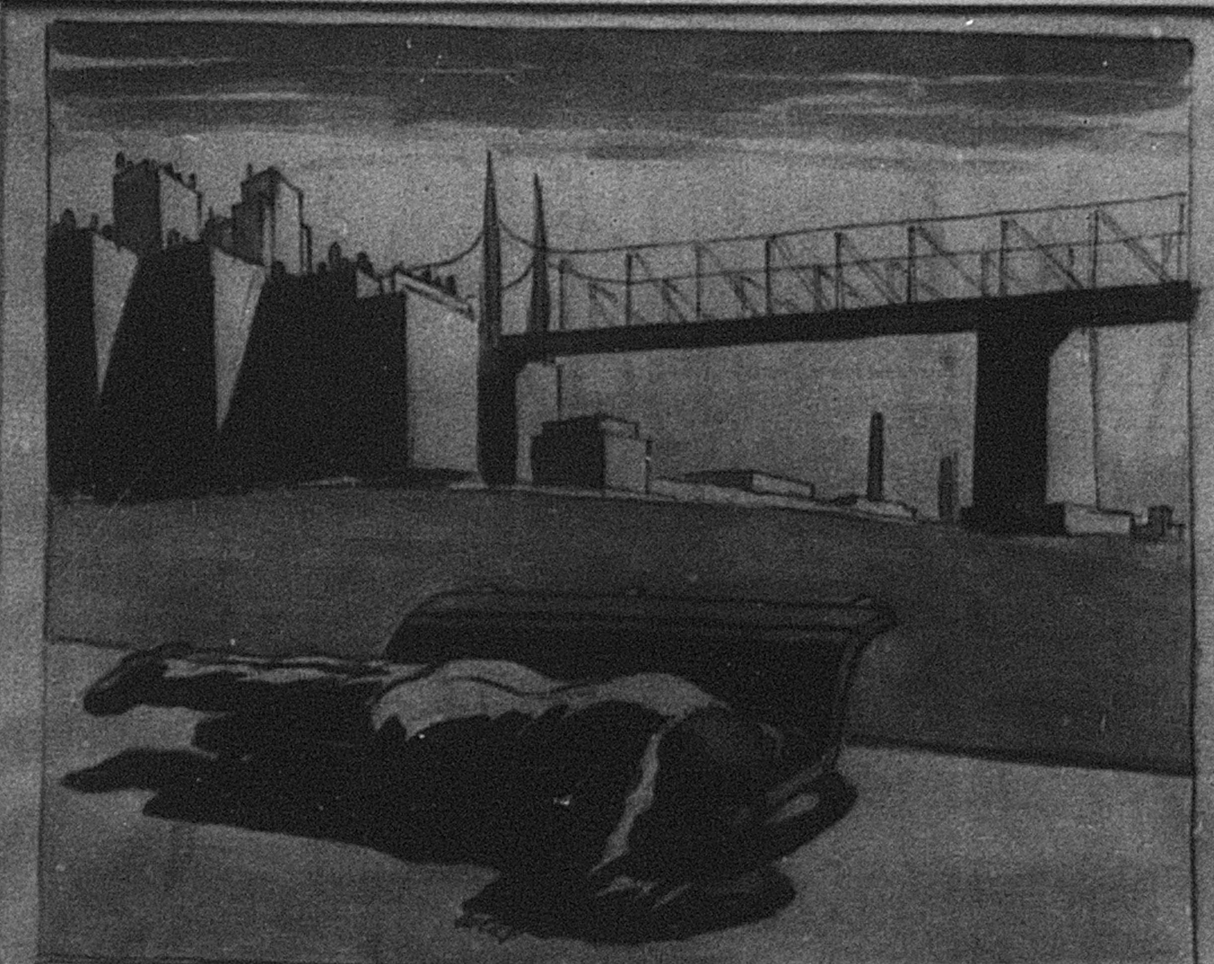 Gustav Wolf ohne Titel 1938/1942 Katalognummer 2648